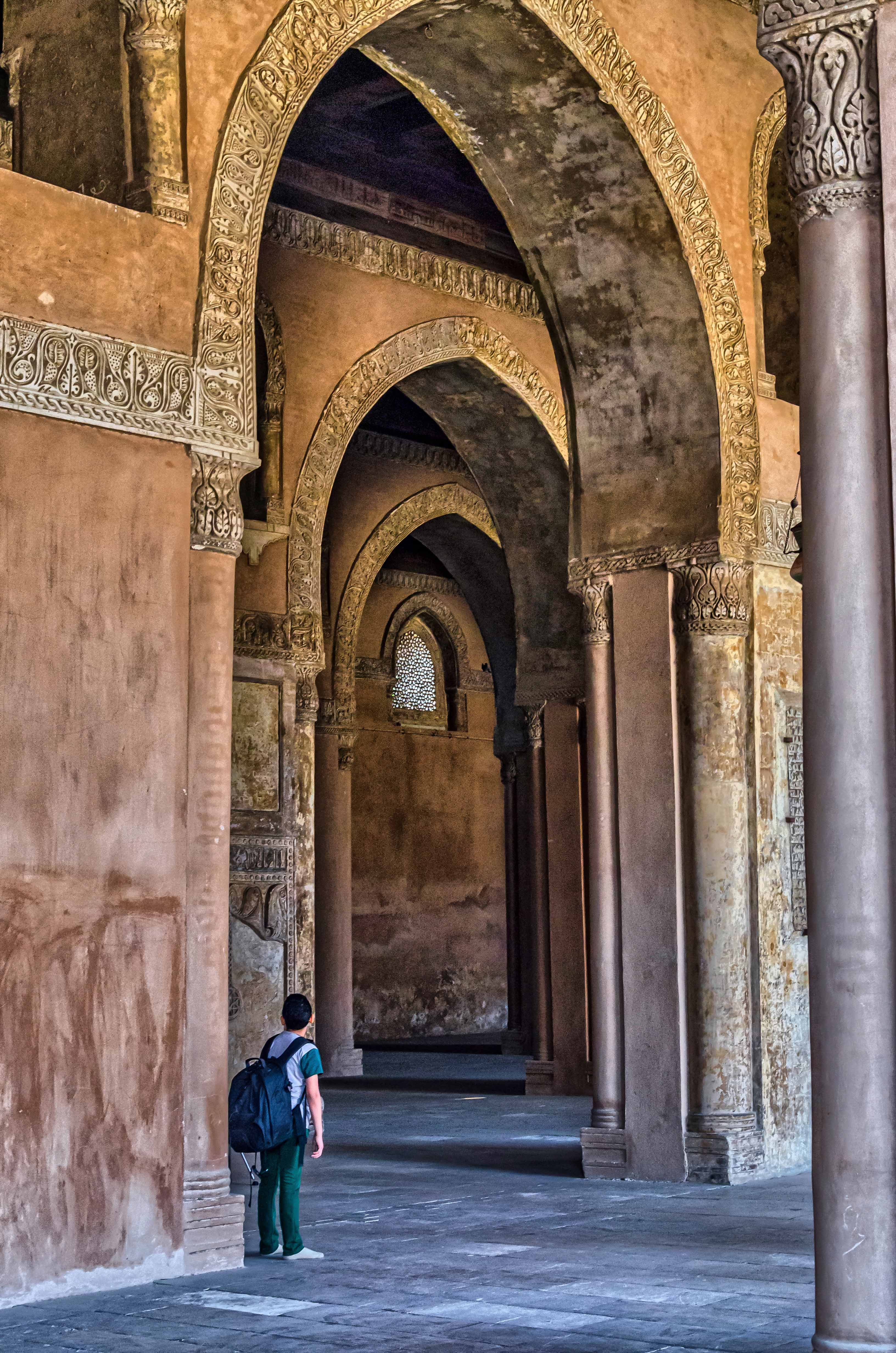 عراقة واصالة مسجد احمد بن طولون - مدينة القاهرة